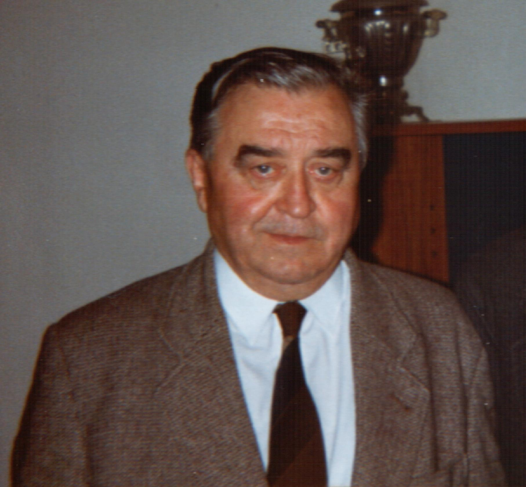 Foto ist aus meinem Privatarchiv entnommen. Die Aufnahme entstand im August 1991 in Berlin.